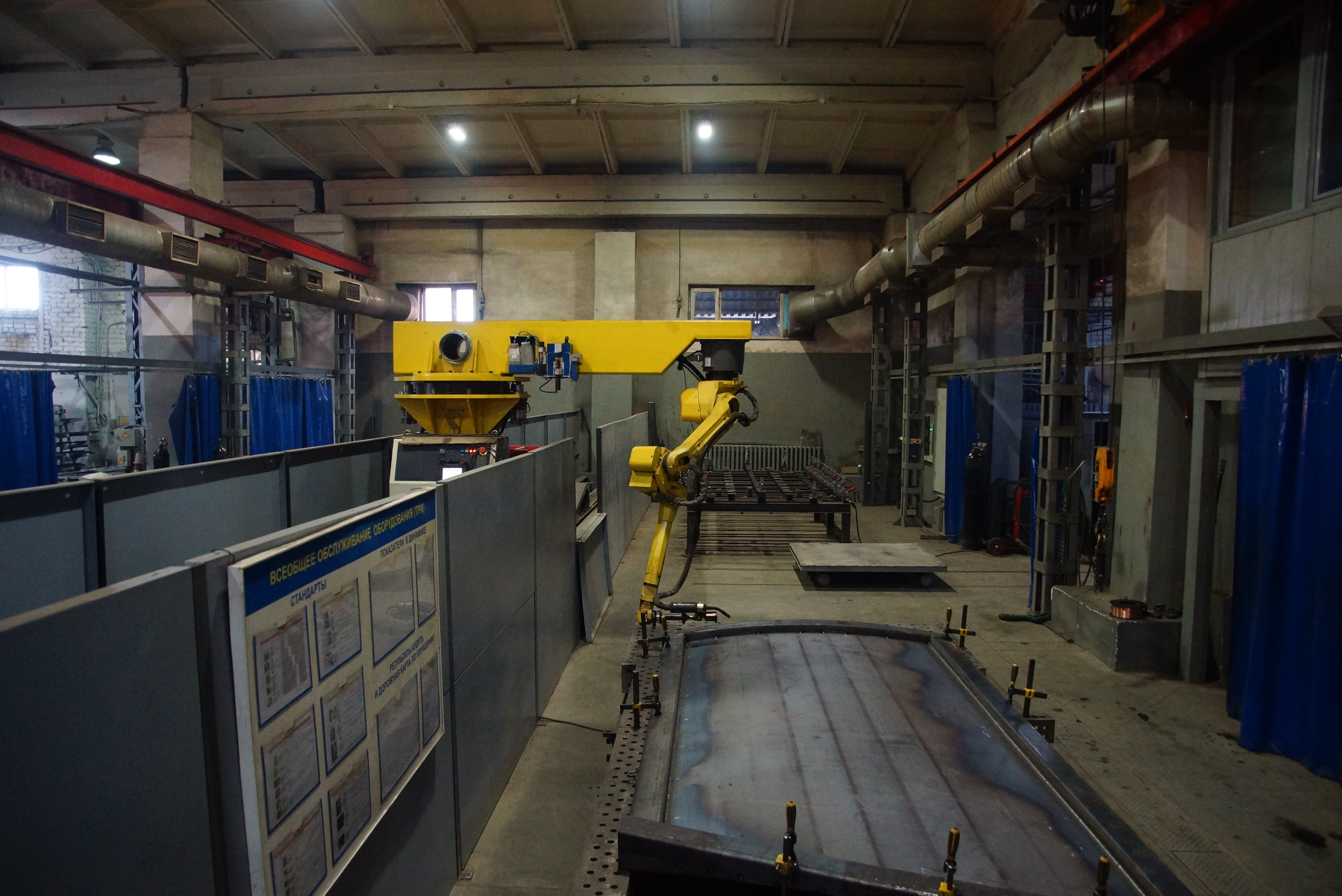 Автоматическая сборка, робот